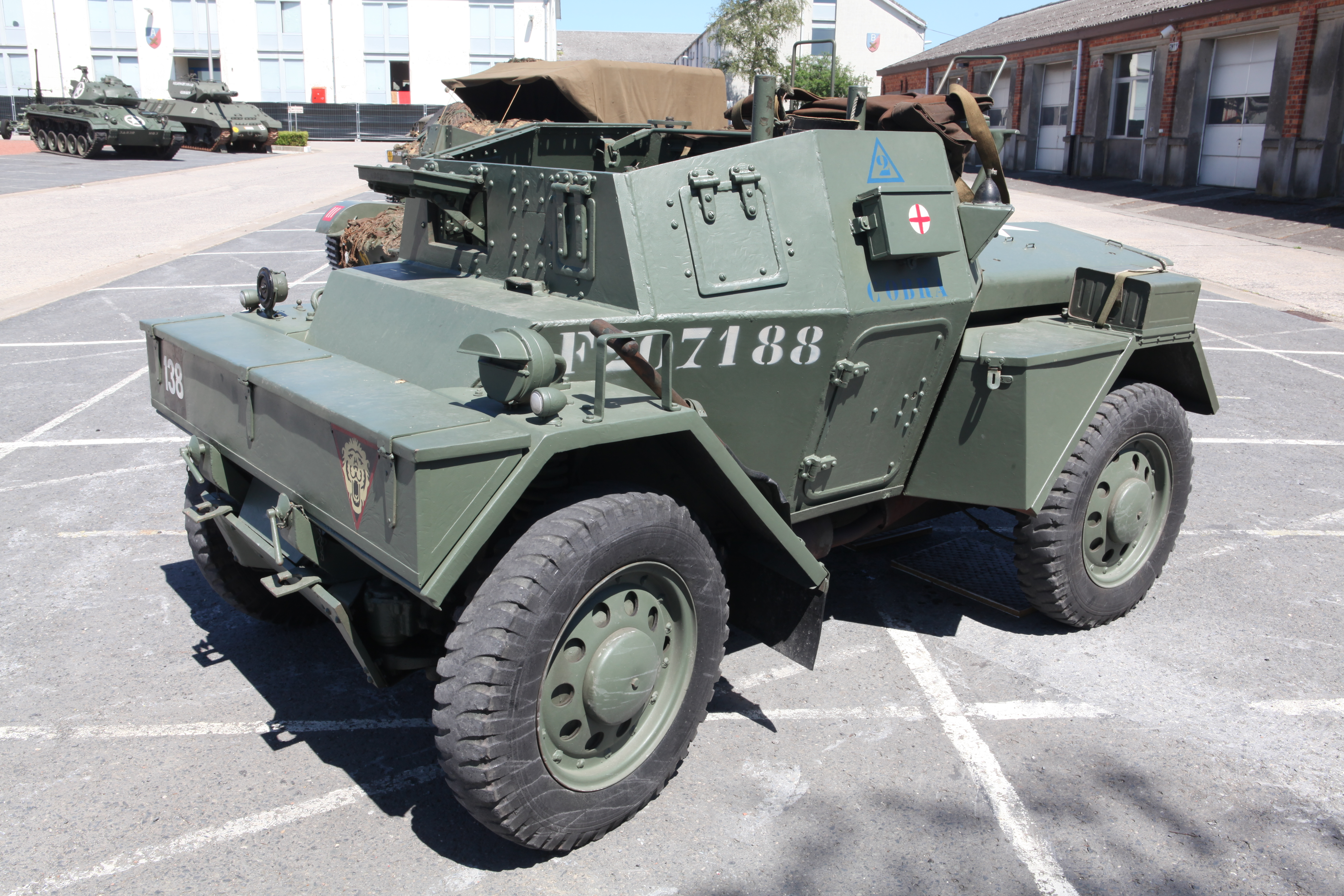 Daimler Dingo